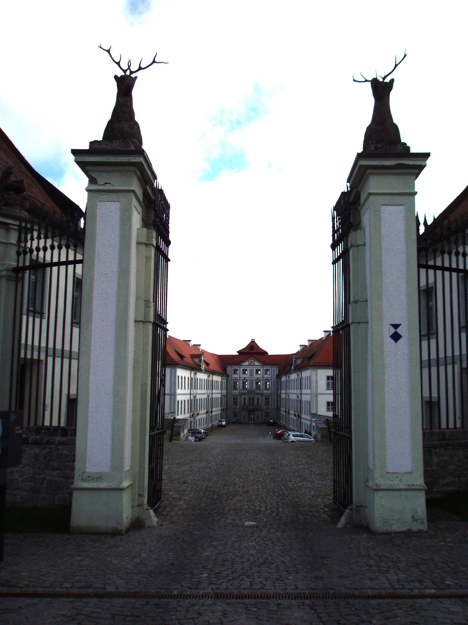 Schloss Hirschberg bei Beilngries, Eingangssituation